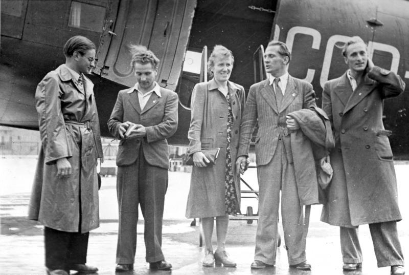 Berlin, Rückkehr FDJ-Delegation aus Sowjetunion ADN-ZB/Archiv/5.8.1947 Rückkehr der seit dem 19.7.1947 in der UdSSR weilenden FDJ-Delegation auf dem Flugplatz Schönefeld am 5.8.1947. Mit diesem sog. "Friedensflug nach Osten" begannen die direkten Kontakte zwischen FDJ und Komsomol. Abgebildete Personen von l.n.r: Geißler, Herbert: damals noch FDJ-Funktionär; wurde Ende 1948 Mitglied im 2. Abgeordnetenhaus von Berlin (West) für die FDP Menzel, Robert: Stellvertretender des Ministers für Verkehrswesen der DDR, SED Baumann, Edith: Volkskammerabgeordnete der DDR, Mitglied des ZK der SED. Honecker, Erich: Staatsratsvorsitzender der DDR, Generalsekretär des ZK der SED (GND 118553399) Keßler, Heinz: Minister für Nationale Verteidigung der DDR, Armeegeneral, (GND 119196719)